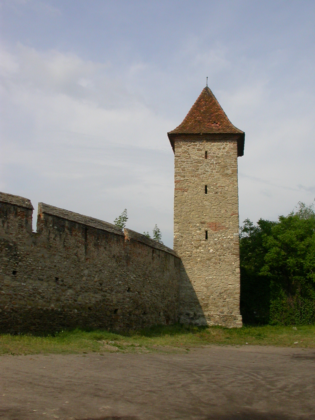 Ansamblul fortificațiiilor orașului, sec. XIV - XVII